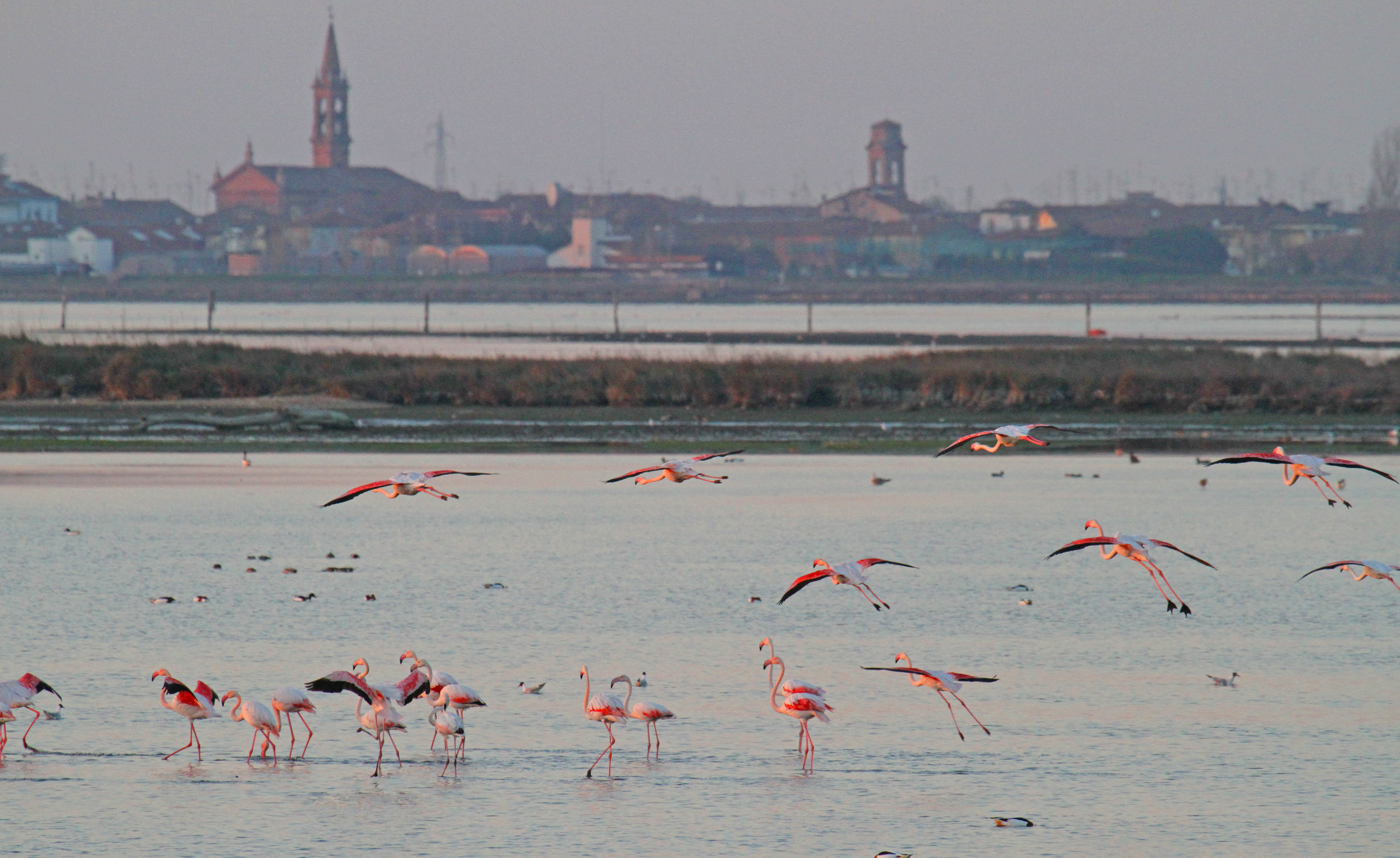 Comacchio e fenicotteri rosa.